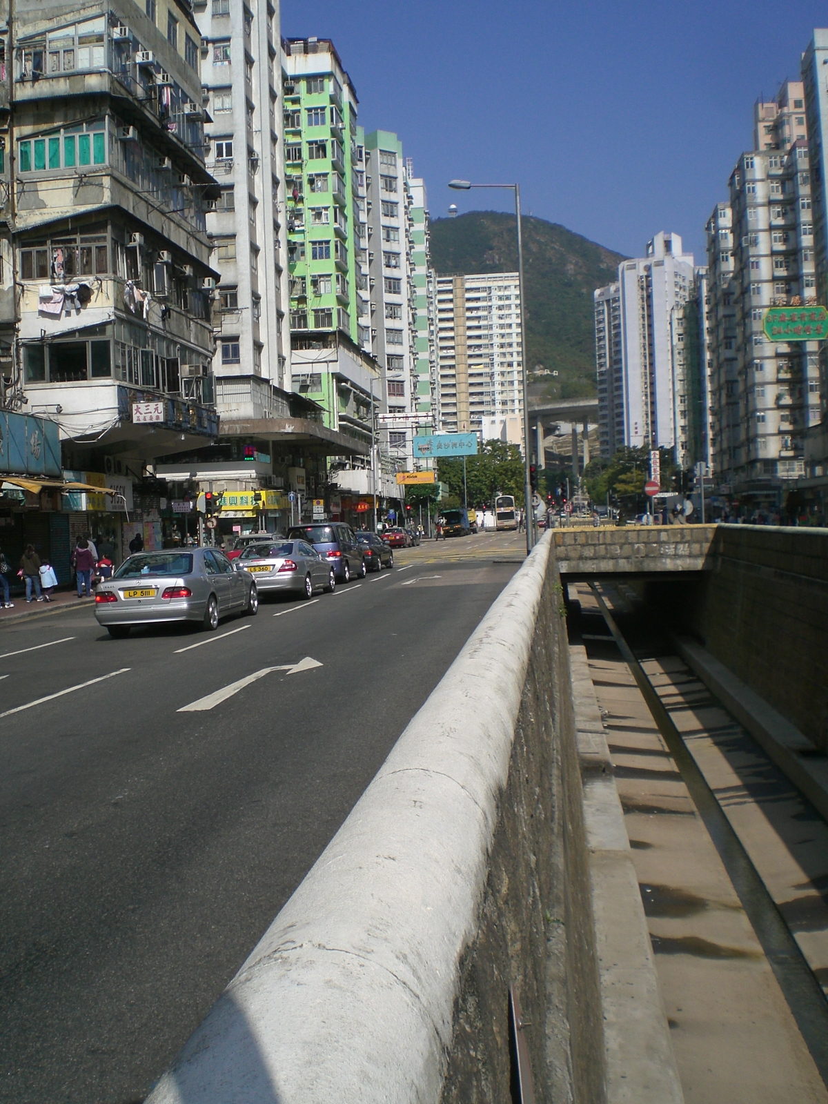 長沙灣東京街及東京街渠